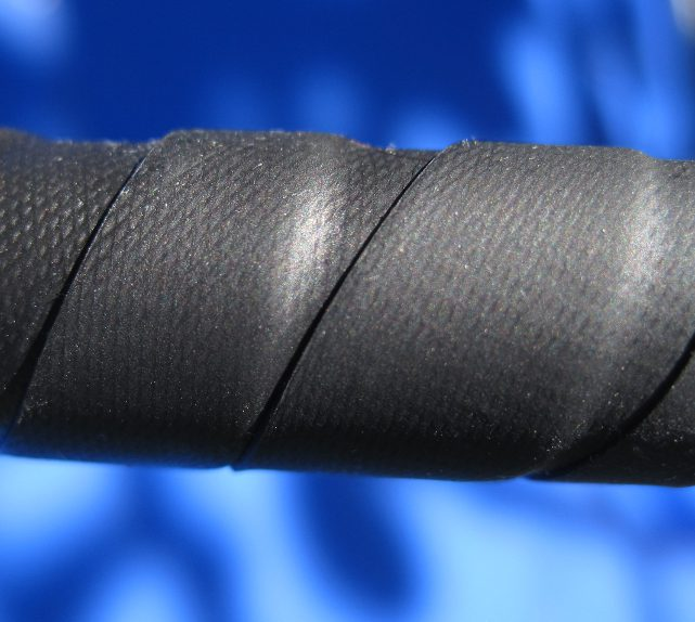 Polyisobutylenband im Einsatz